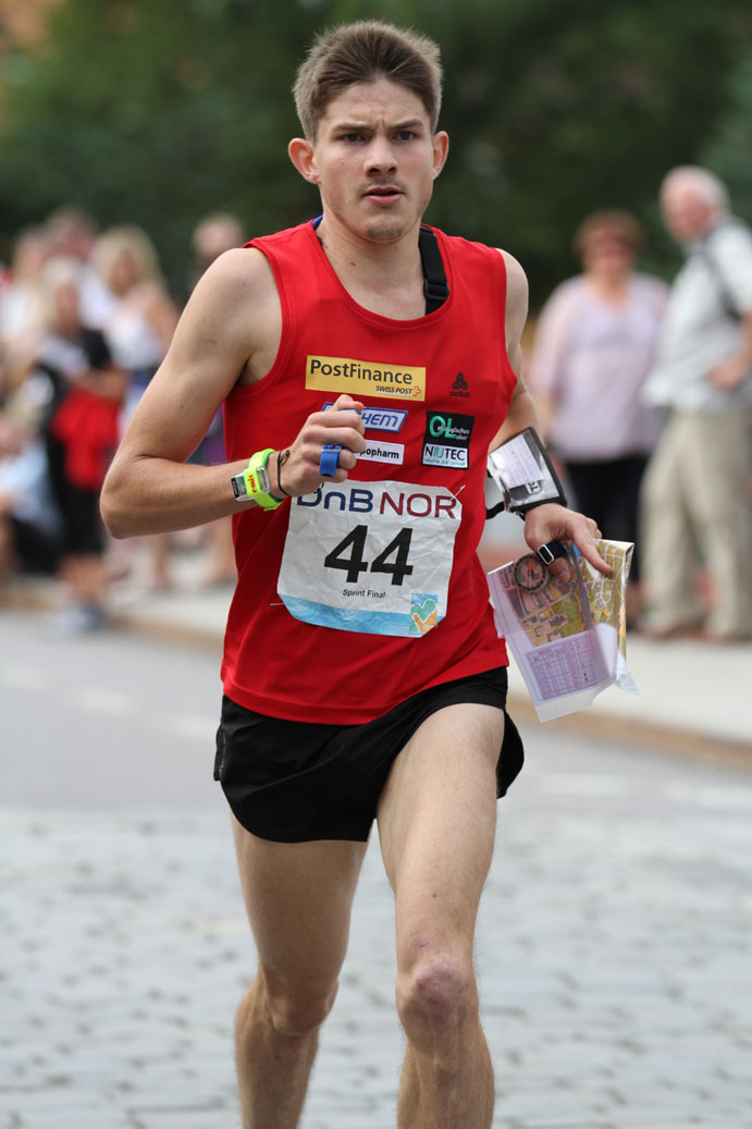 Fabian Hertner at WOC 2010